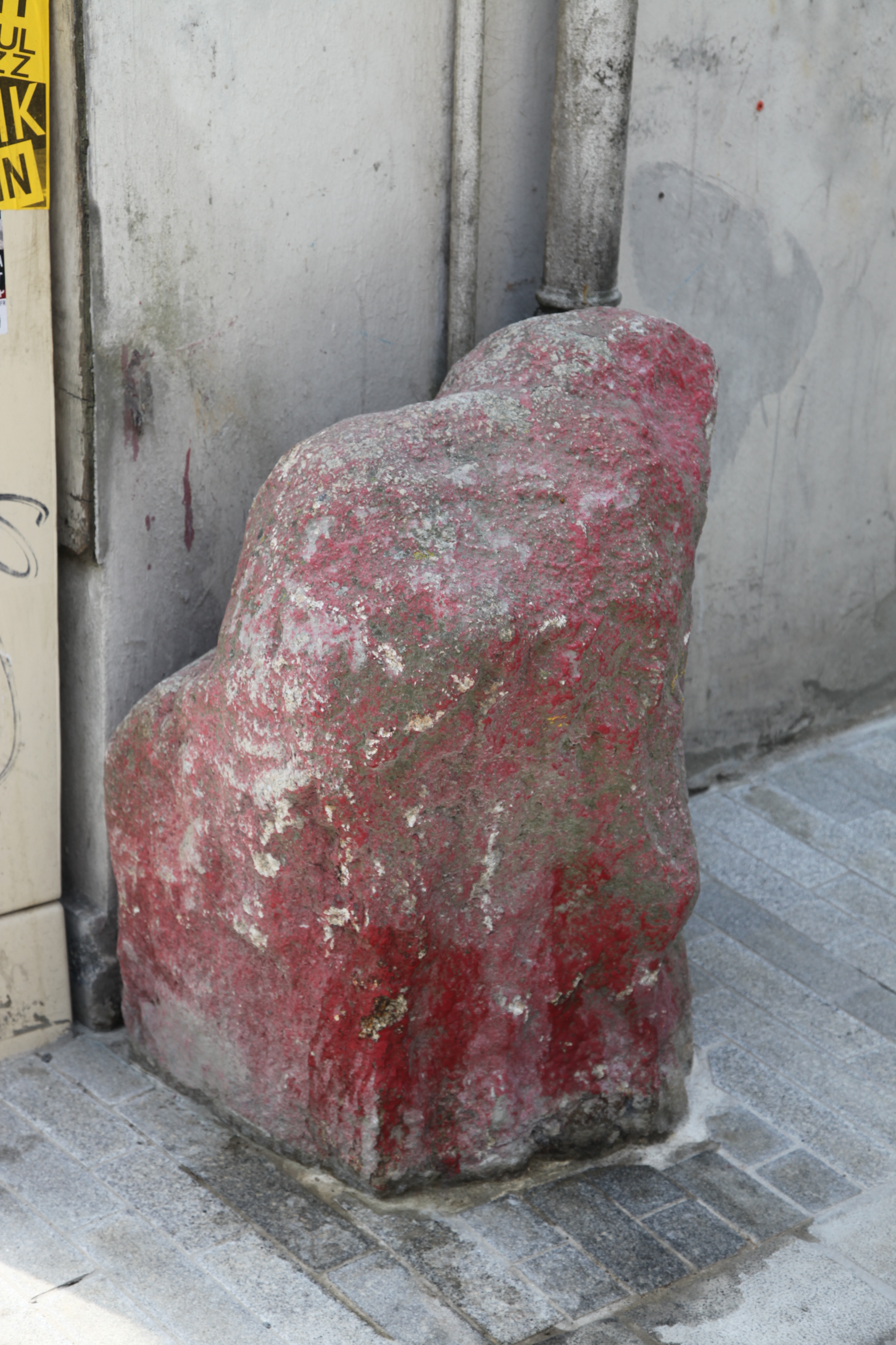 Le fameux "Pilier rouge", à l'angle des rues Jean-Jaurès et Maria-Chapdelaine de Brest. Ce menhir, datant du Néolithique, a servi de borne que les régiments ne devaient pas franchir.